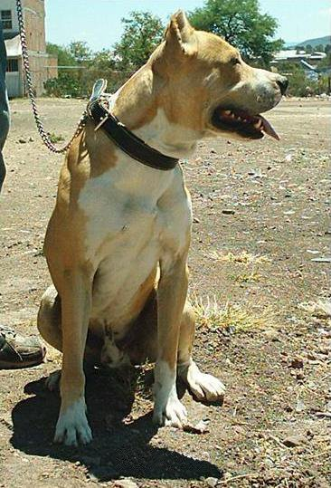 Lealtad, Coraje y Valor. Asi se define esta raza. 2007-04-04